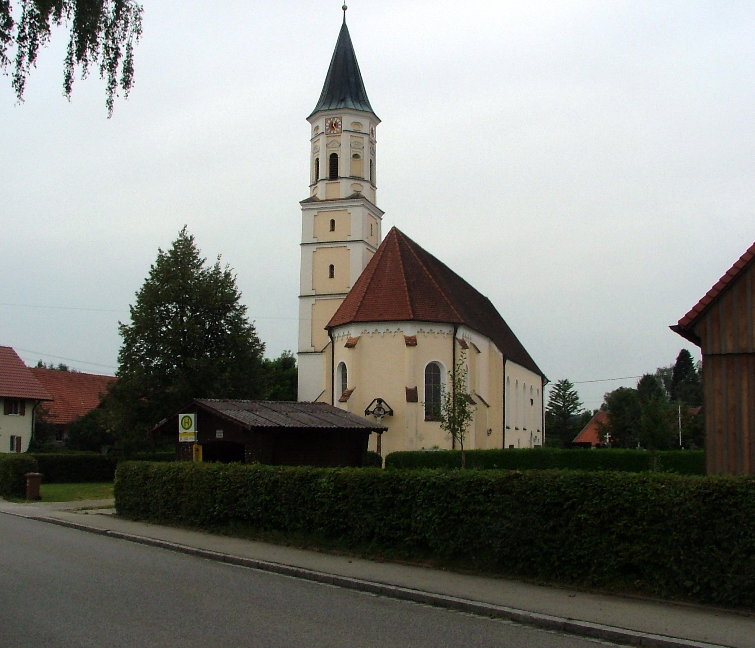 Oberrieden, Kath. Pfarrkirche St. Martin